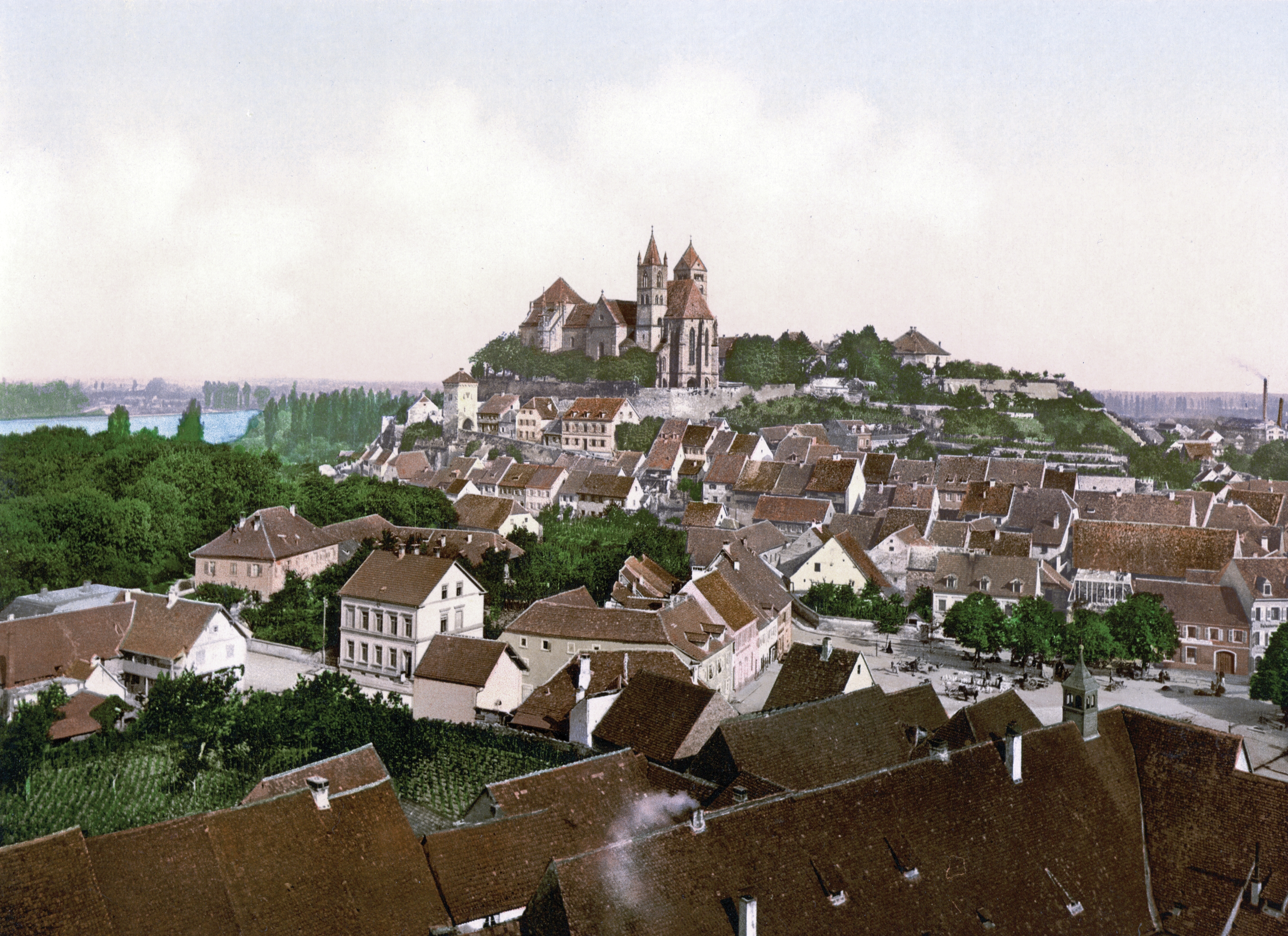 Alt-Breisach